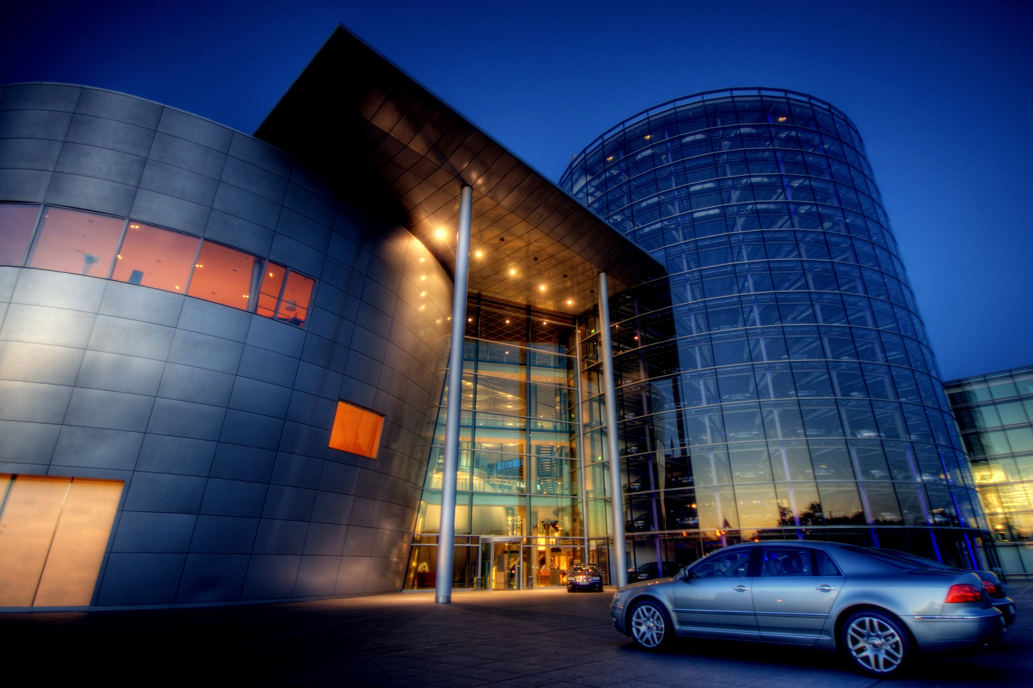 Glass manufacture VW phaeton dresden - Gläserne Manufaktur VW Phaeton Dresden